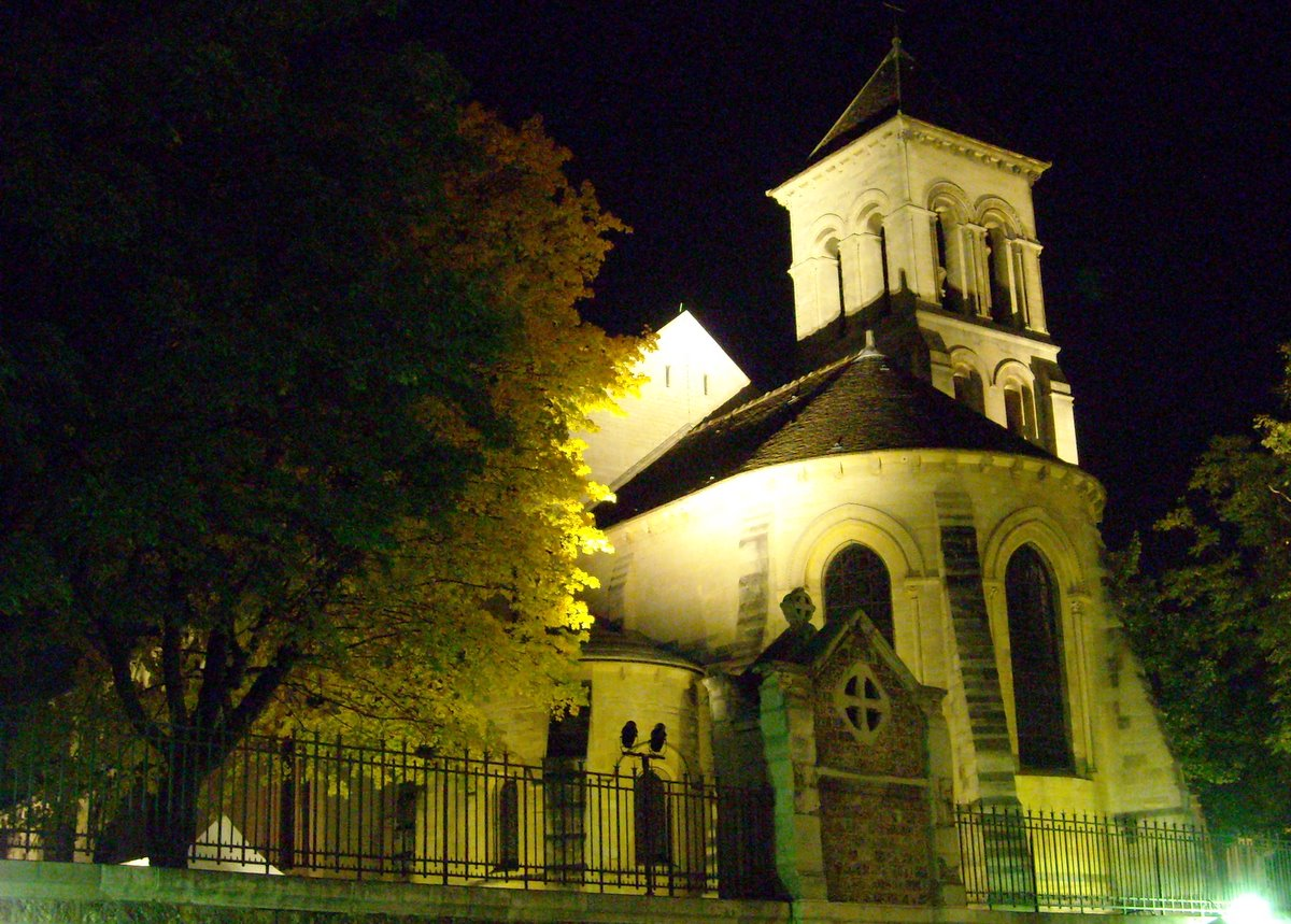 Clocher de l'église Saint-Pierre de Montmartre (Paris) vu de nuit